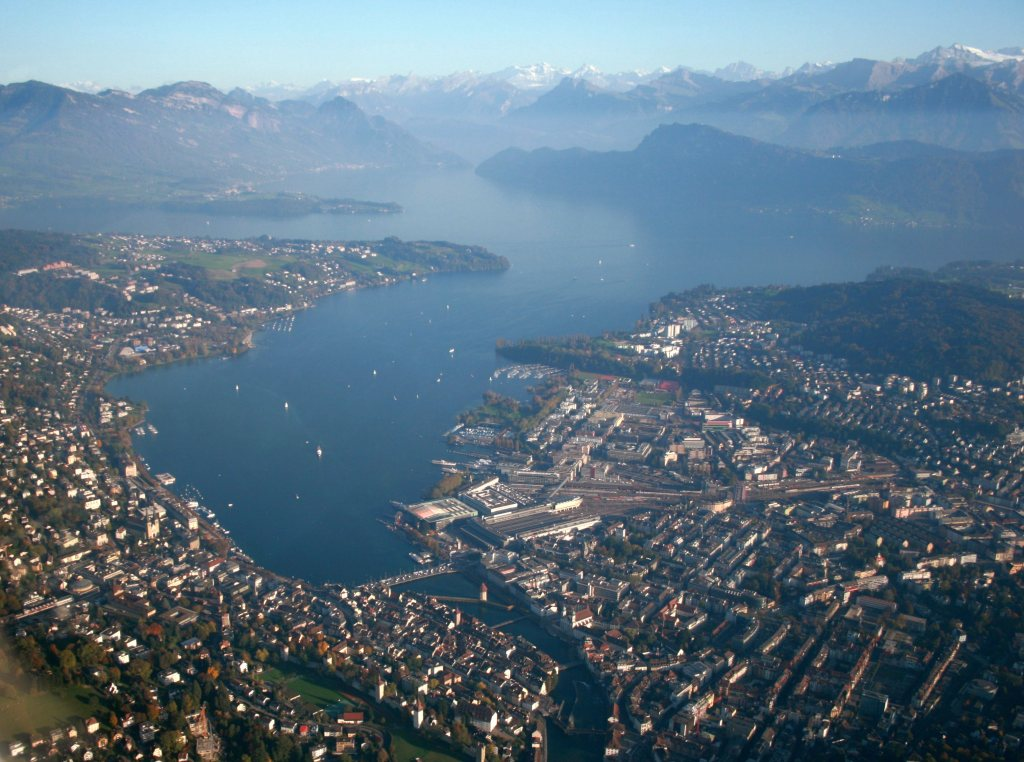 Luzern am Vierwaldstättersee, Luftaufnahme